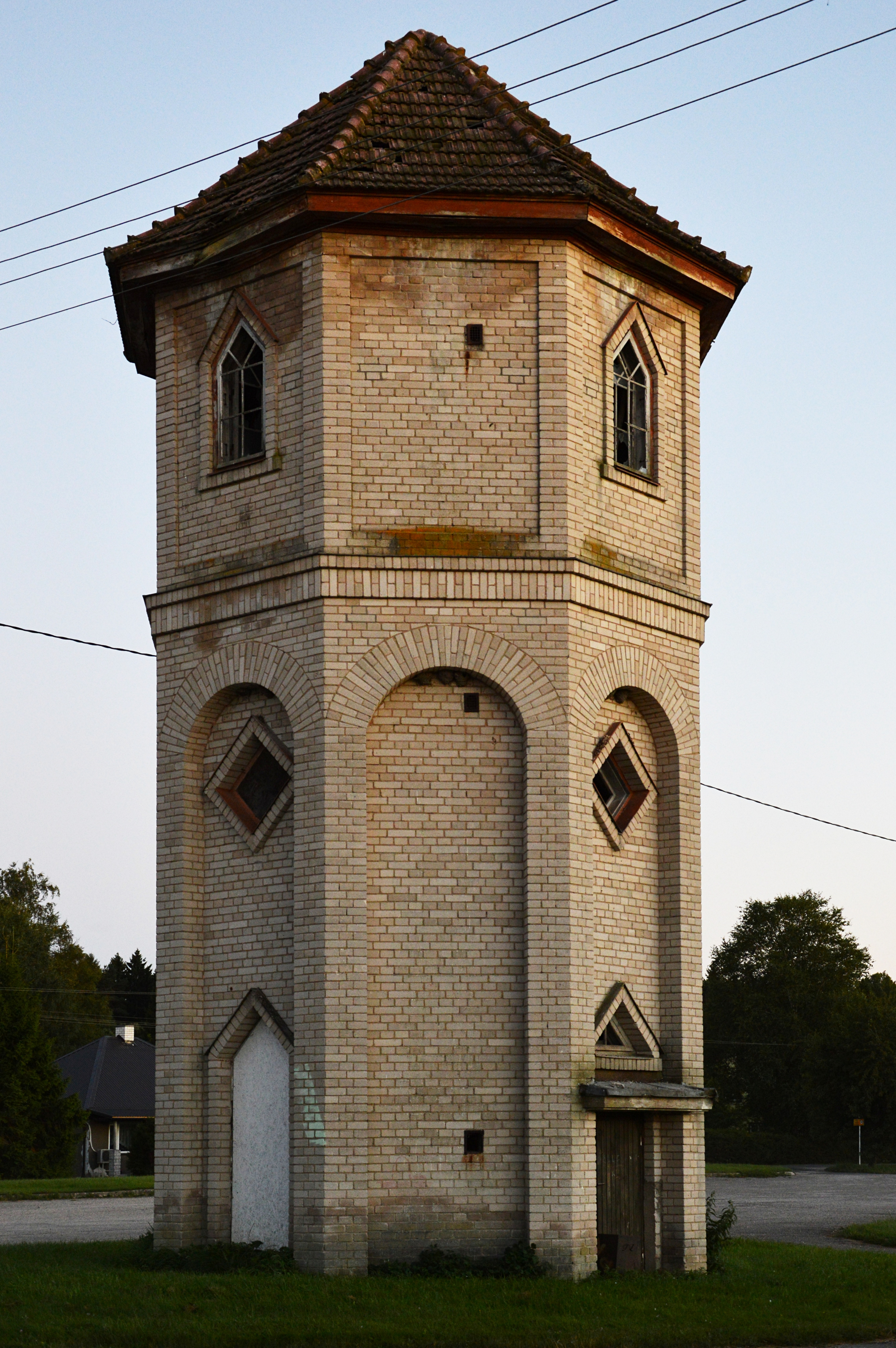 Vana-Vigala endise raudteejaama veetorn.